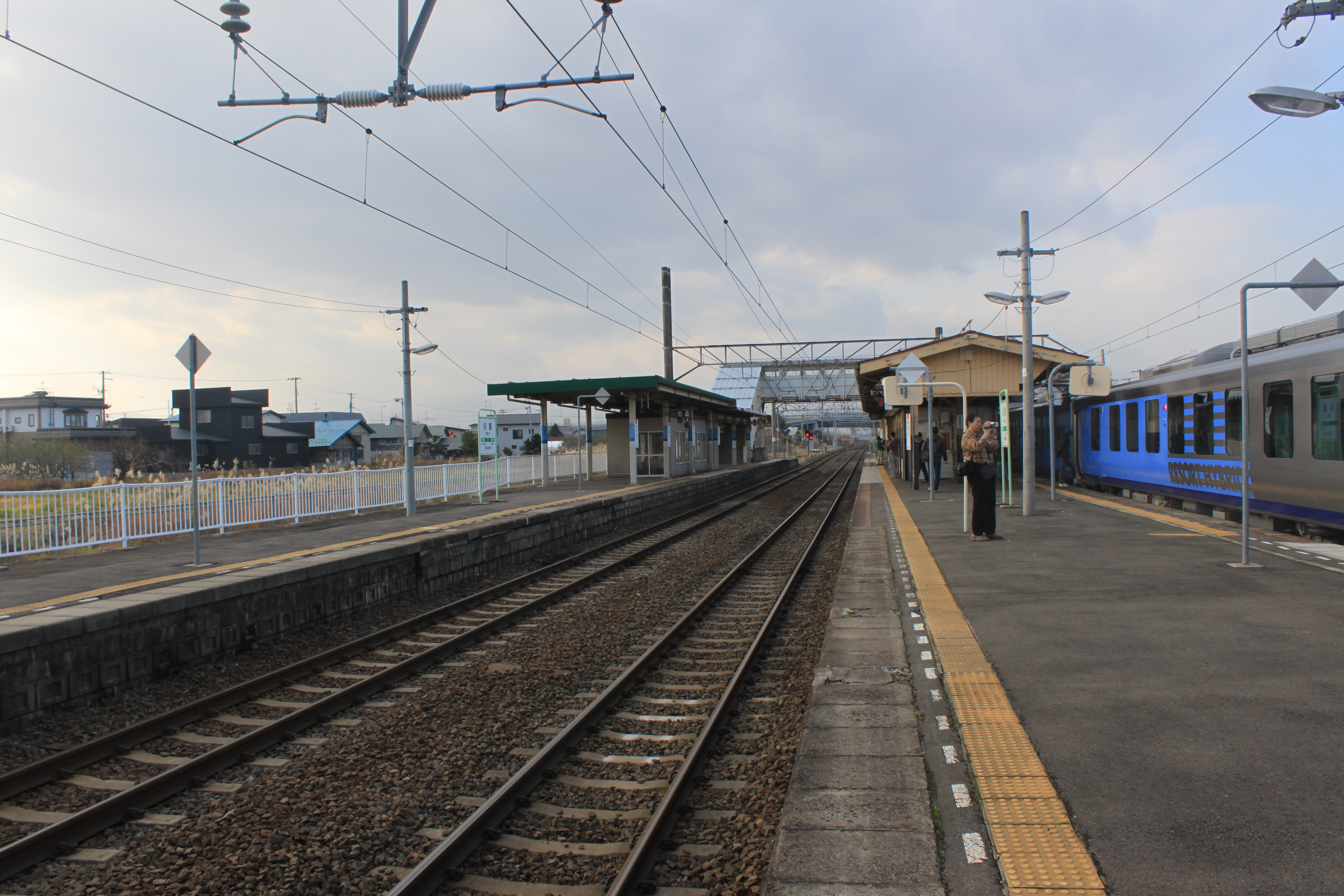 川部駅